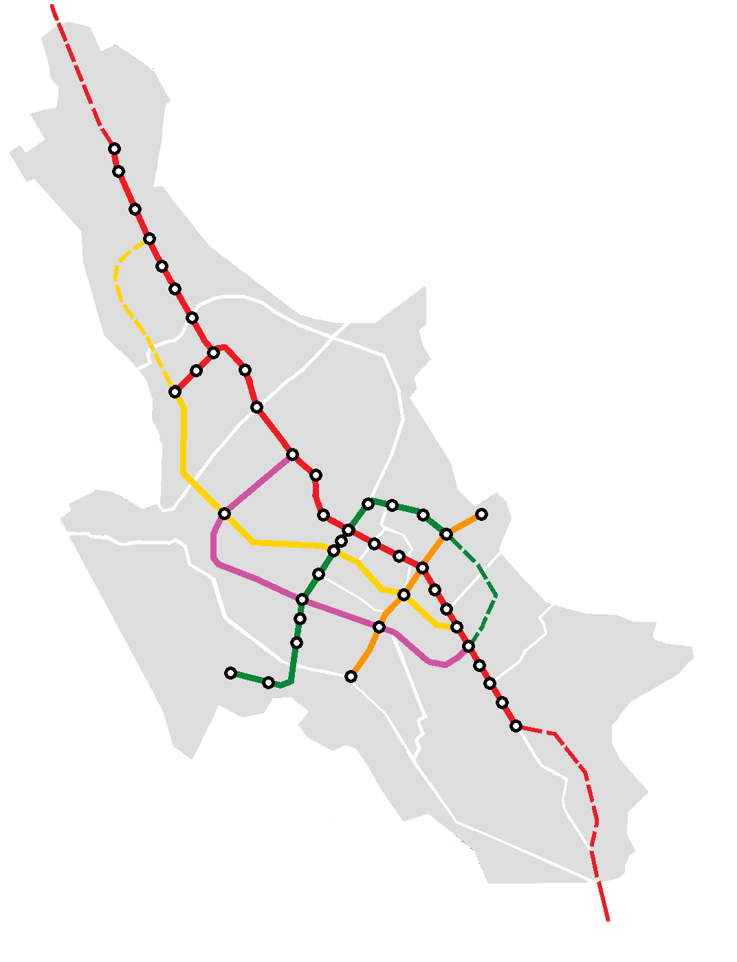 نقشه جغرافیایی خطوط قطار شهری شیراز و مناطق شهرداری شهر